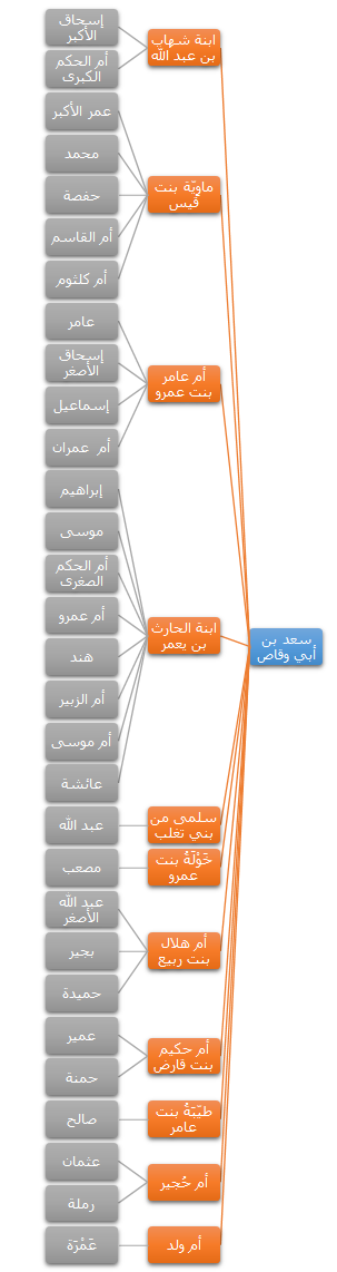 شجرة عائلة سعد بن أبي وقاص